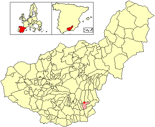 Situación de la localidad de Narila (en el municipio de Cádiar) respecto a la provincia de Granada, en España.